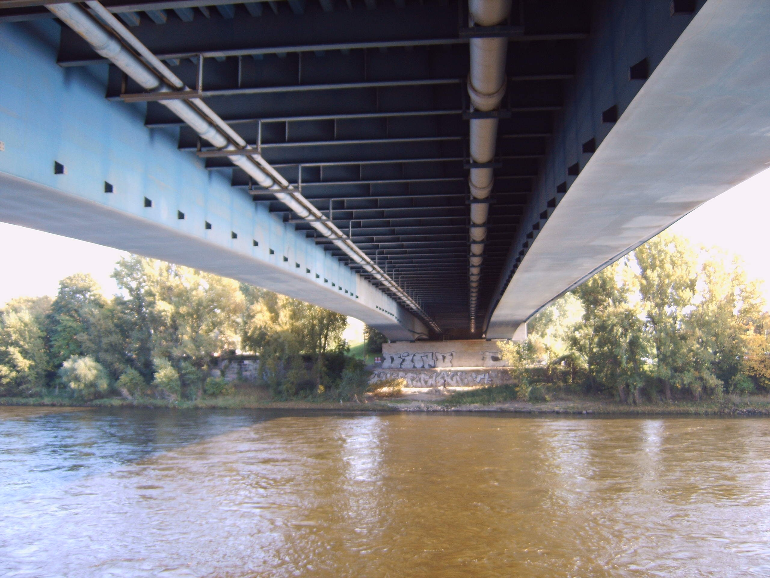 Neue Strombrücke Magdeburg, Blick unter die Brücke, auf die Elbe, Bild selbst aufgenommen am 11.10.2005